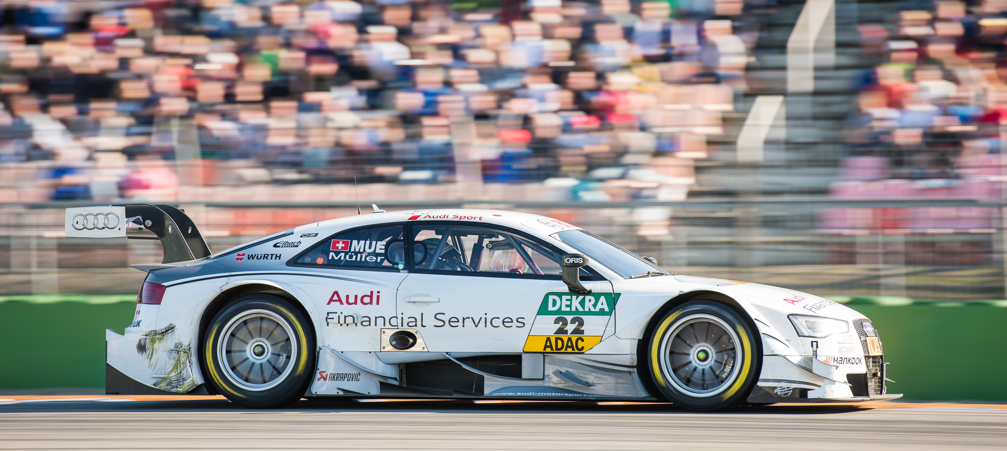 Audi Financial Services Audi RS 5 DTM,DTM,Deutsche Tourenwagen Masters,Hockenheimring,Motorsport,Nico Müller,Team Rosberg GmbH